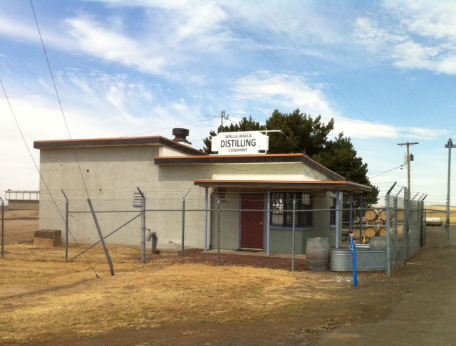 Bilde av Walla Walla Distillery